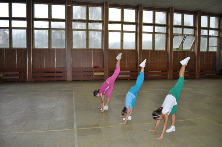 Trojice kadetek ve sportovním aerobicu